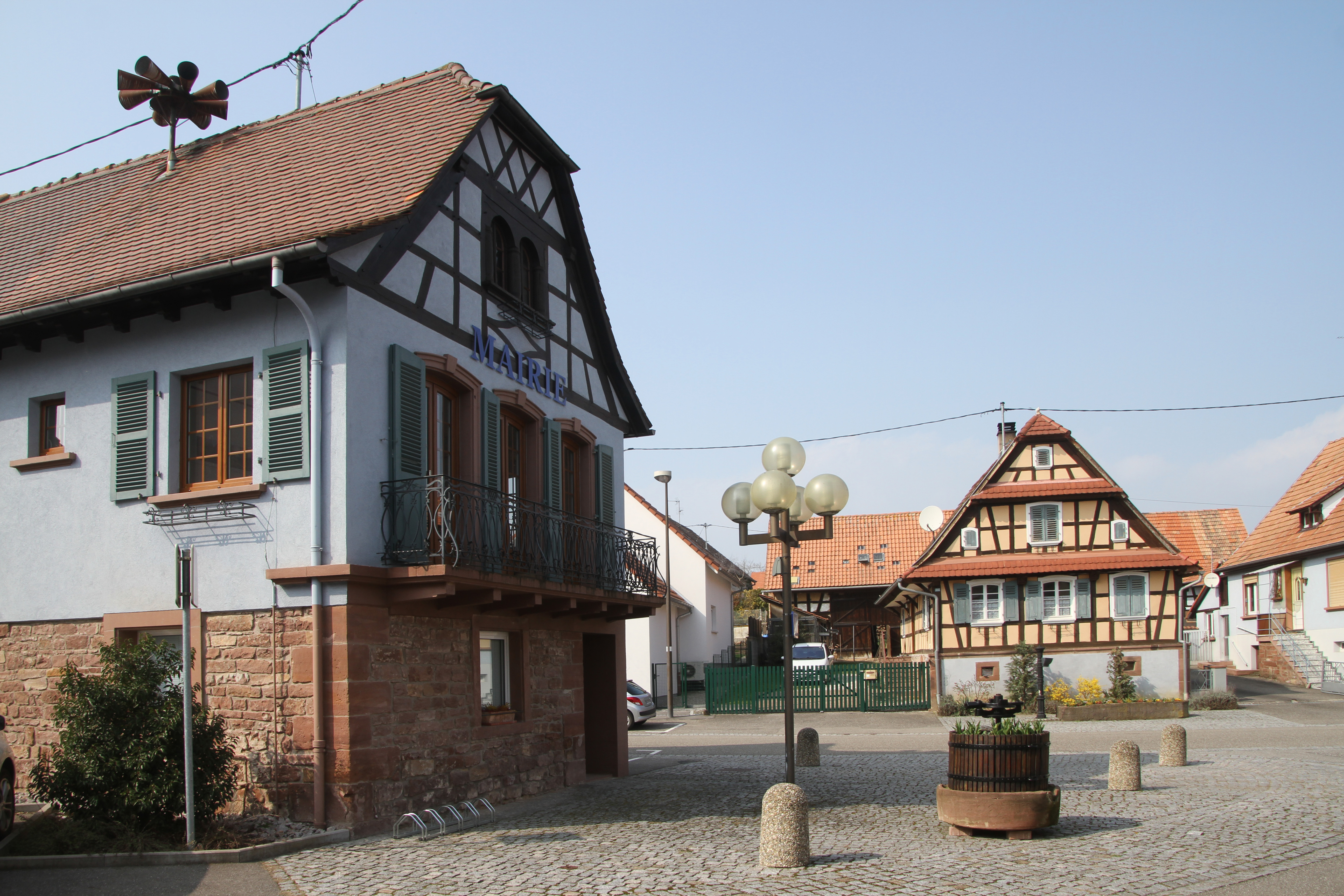 Morsbronn-les-Bains